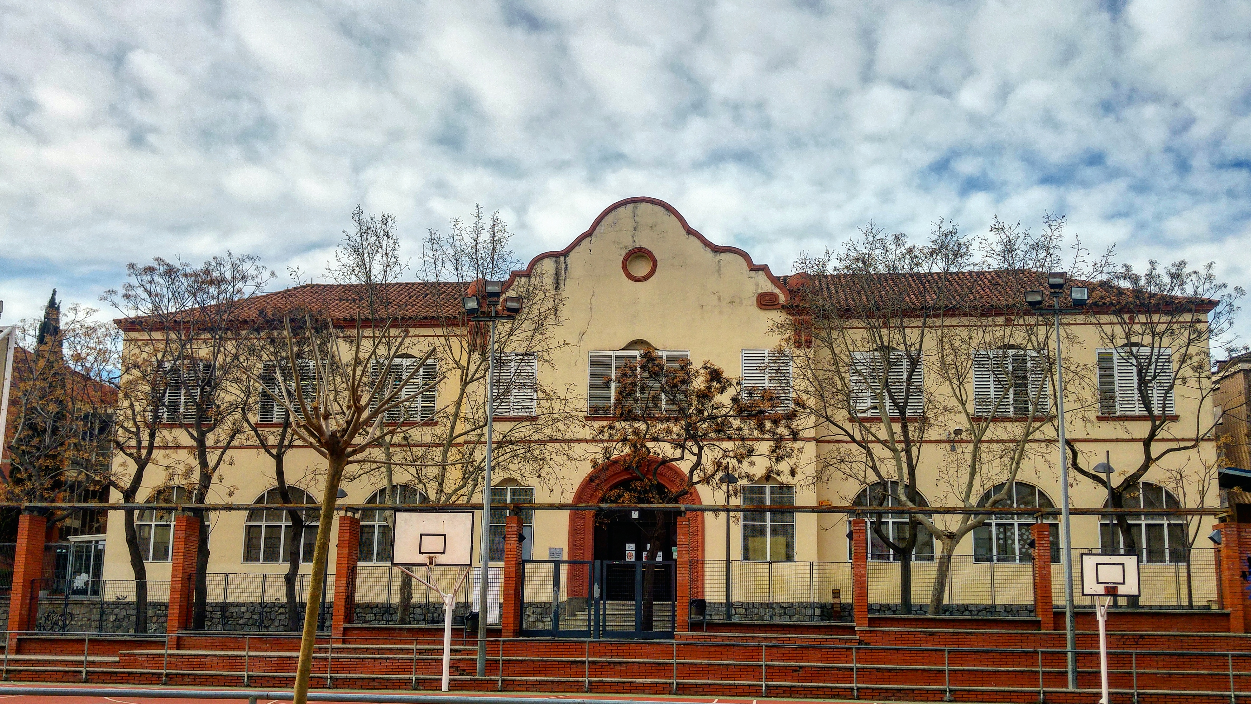 Escola Joan Maragall, primera escola pública de Sant Cugat, inaugurada el 26 de juny de 1932 pel president Macià, de l'arquitecte Enric Mora Gosch